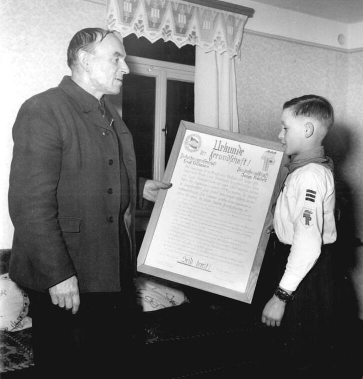 Etterwinden, Freundschaftsvertrag JP und LPG Zentralbild Albrecht 2.2.1953 Junge Pioniere schreiben Dorfchronik In einem Freundschaftsvertrag mit der Landwirtschaftlichen Produktionsgenossenschaft "Ernst Thälmann" in Etterwinden, Kreis Eisenach, verpflichteten sich die Jungen Pioniere des Ortes, die Geschichte des Dorfes zu studieren und eine Chronik zu scheriben. UBz: Gert Schmidt, der Freundschaftsratsvorsitzende, überreichte dem Vorsitzenden der Produktionsgenossenschaft Karl König die Urkunde für den Freundschaftsvertrag.